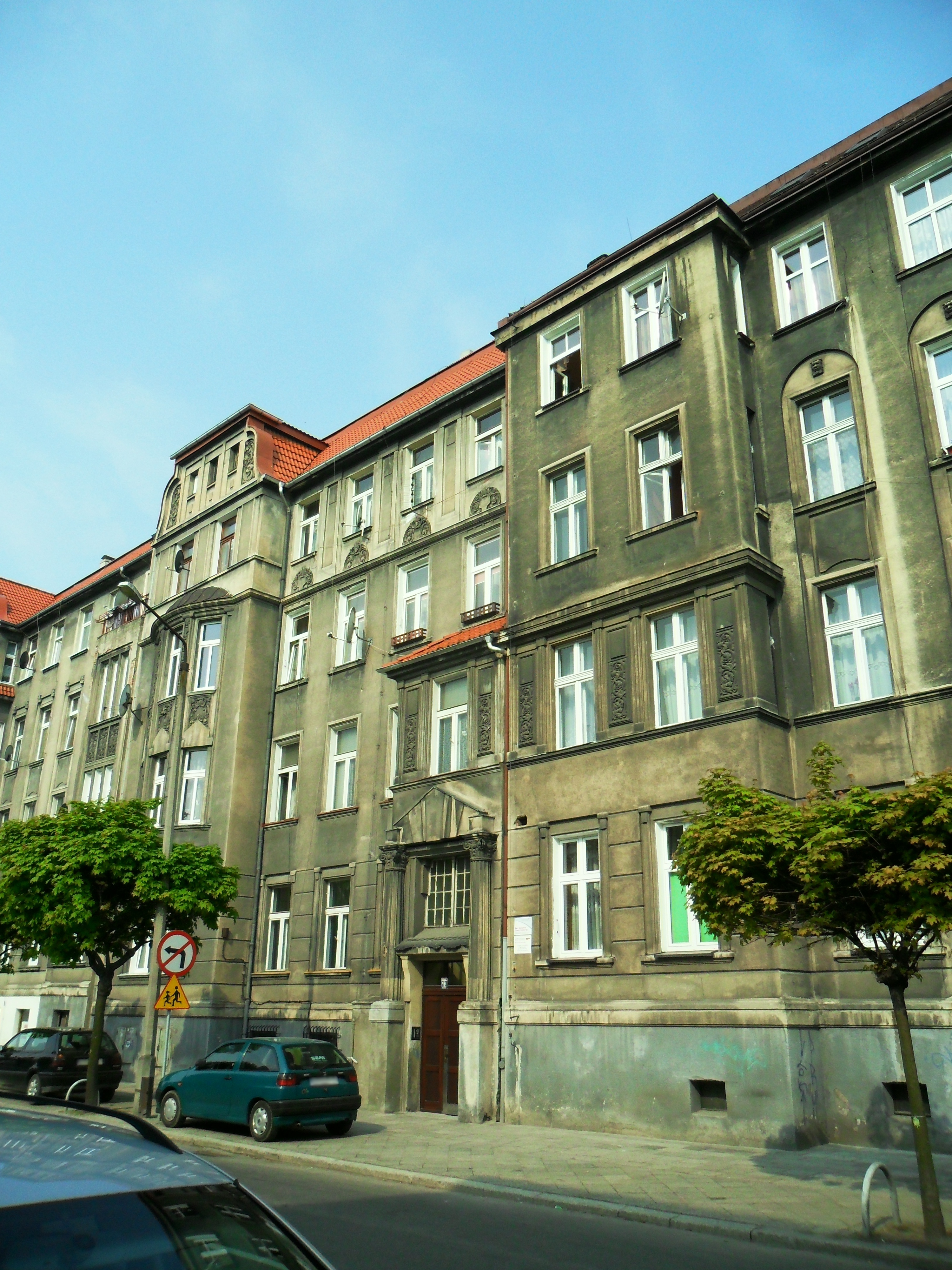 Kamienica przy ulicy Wileńskiej 19 w Raciborzu.